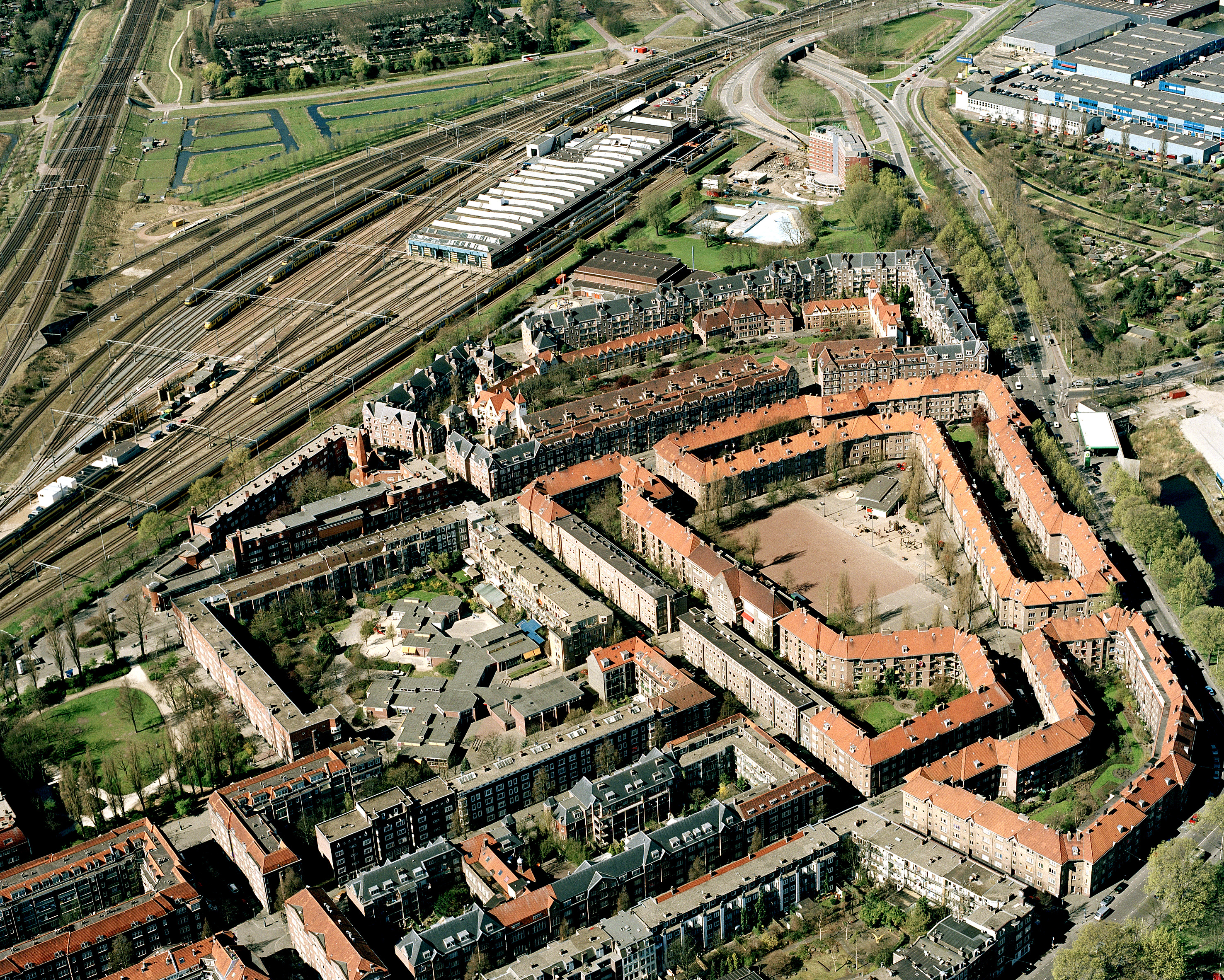 Luchtfoto: Luchtfoto Spaarndammerplantsoen (opmerking: Gefotografeerd voor Monumenten In Nederland Noord-Holland)